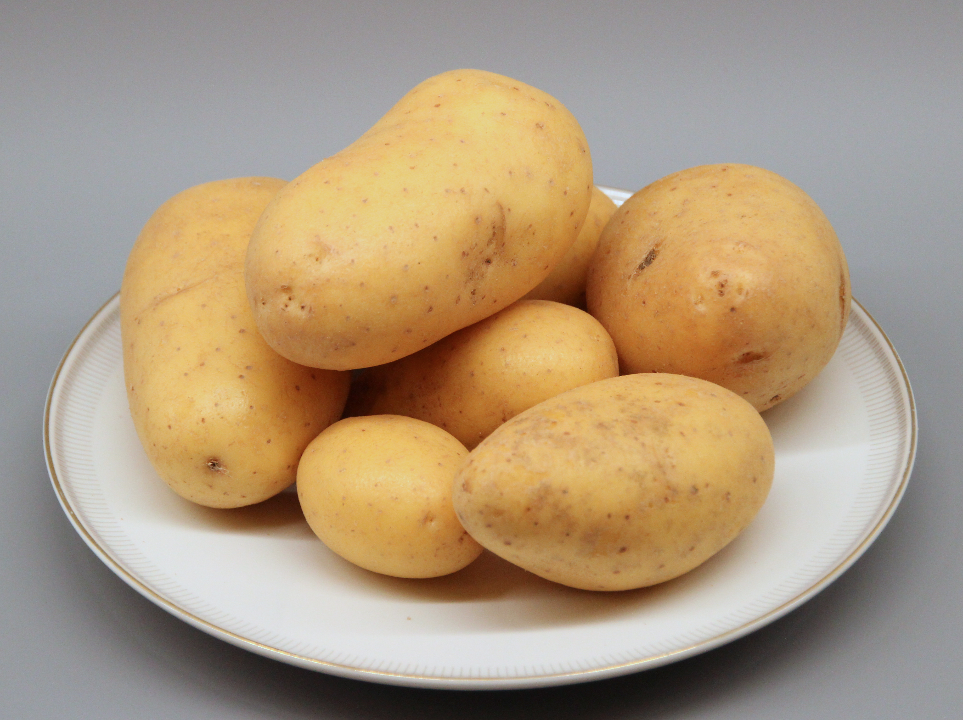 Bildinhalt: Kartoffeln der Sorte Allians Aufnahmeort: Frankfurt am Main, Deutschland